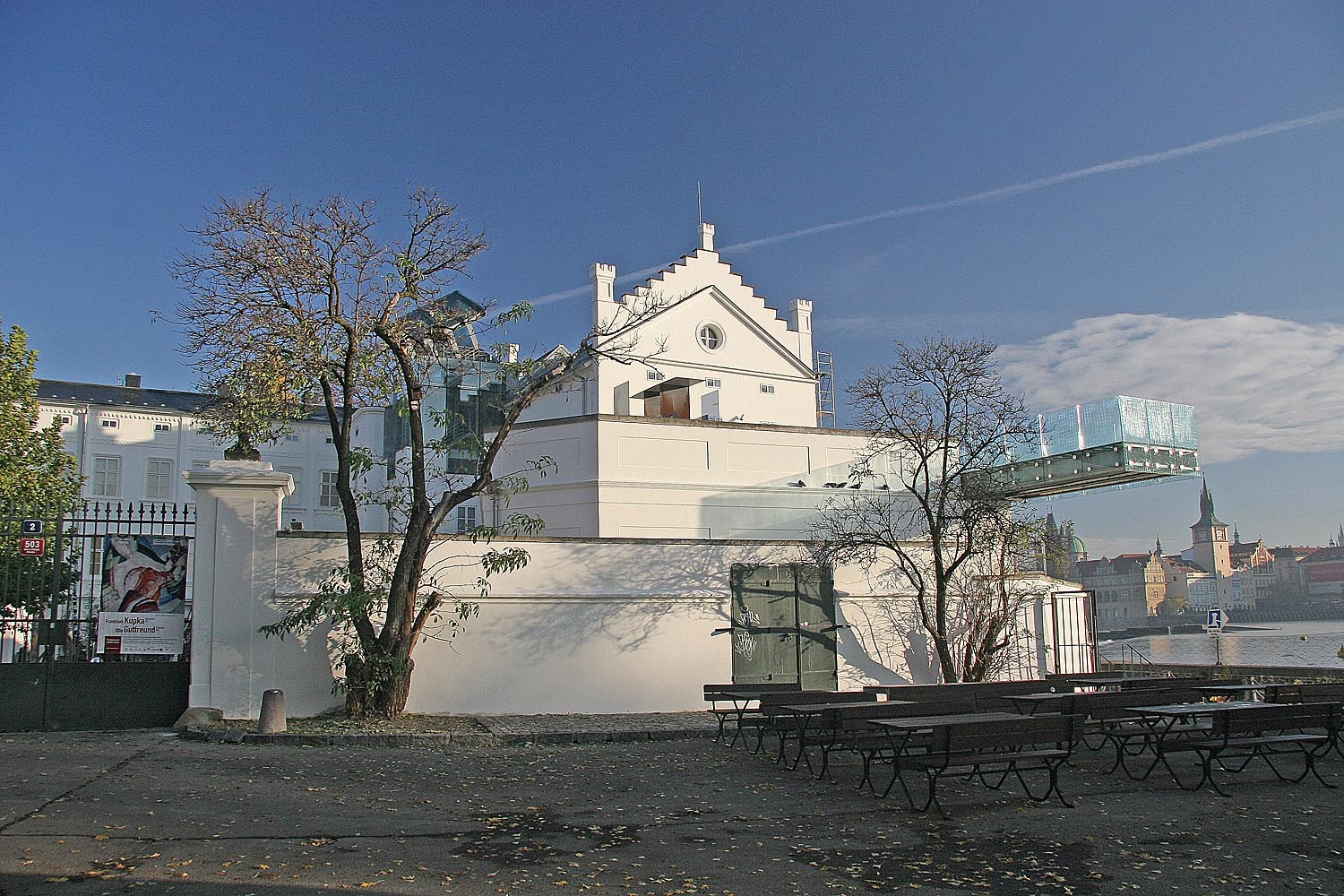 Sovovy mlýny - Museum Kampa